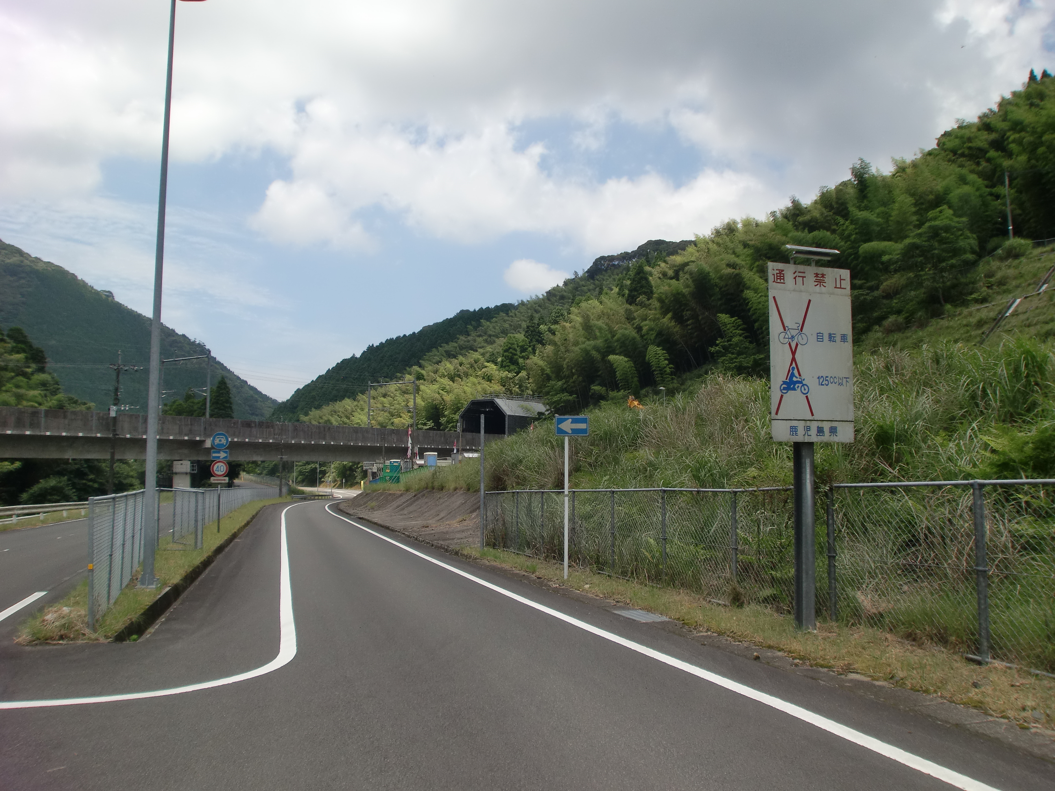 中屋敷インターチェンジの出水方面インランプを国道504号から撮影。